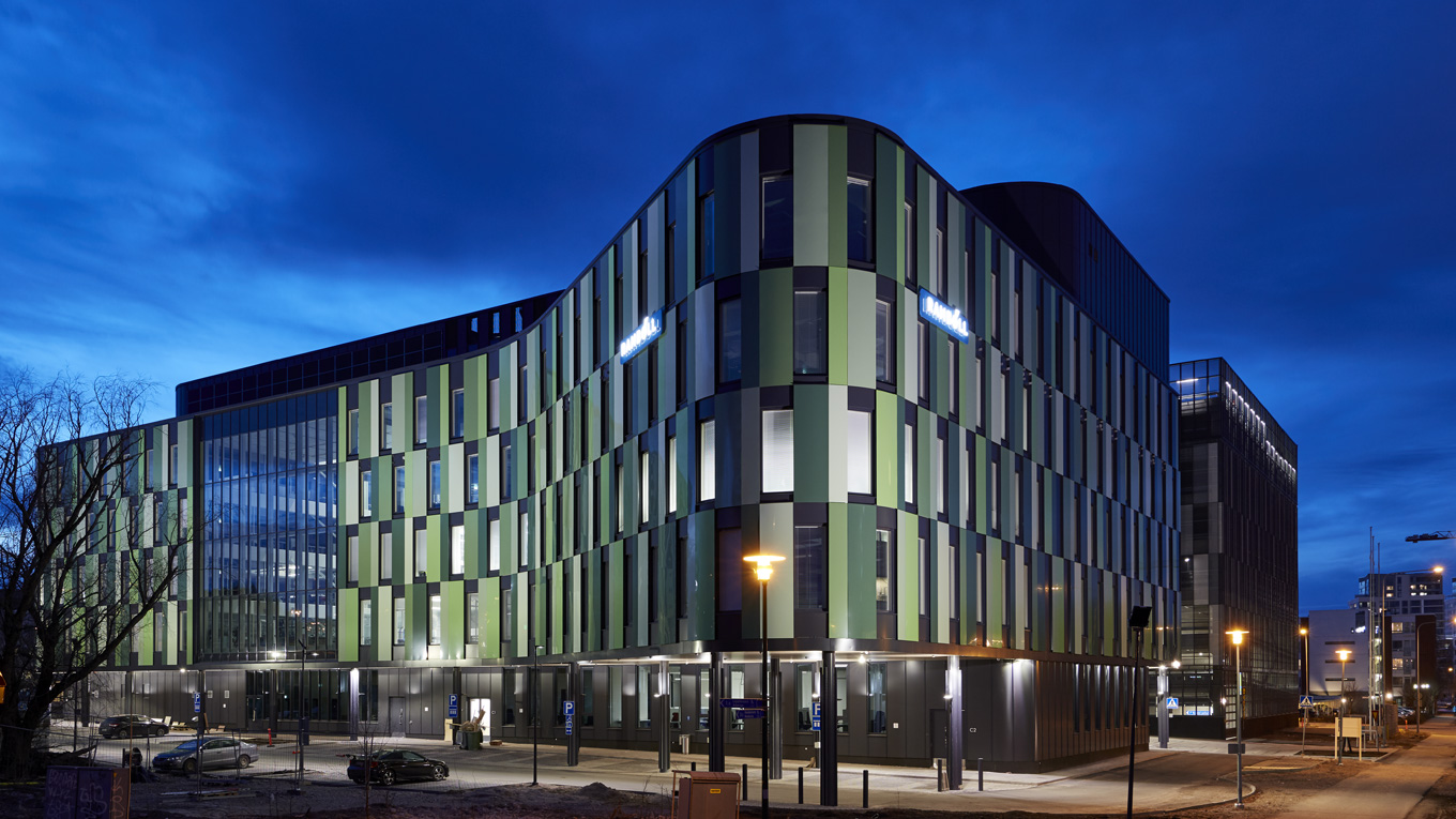 Espoon Perkkaalla sijaitseva Ramboll Village toimii Rambollin Suomen pääkonttorina. Toimistotalokokonaisuuden omistaa Keva ja sen on urakoinut Hartela. Rakennuksen on suunnitellut arkkitehtitoimisto Cederqvist & Jäntti Arkkitehdit Oy ja Rambollin asiantuntijat ovat vastanneet kohteen kaikesta muusta suunnittelusta.